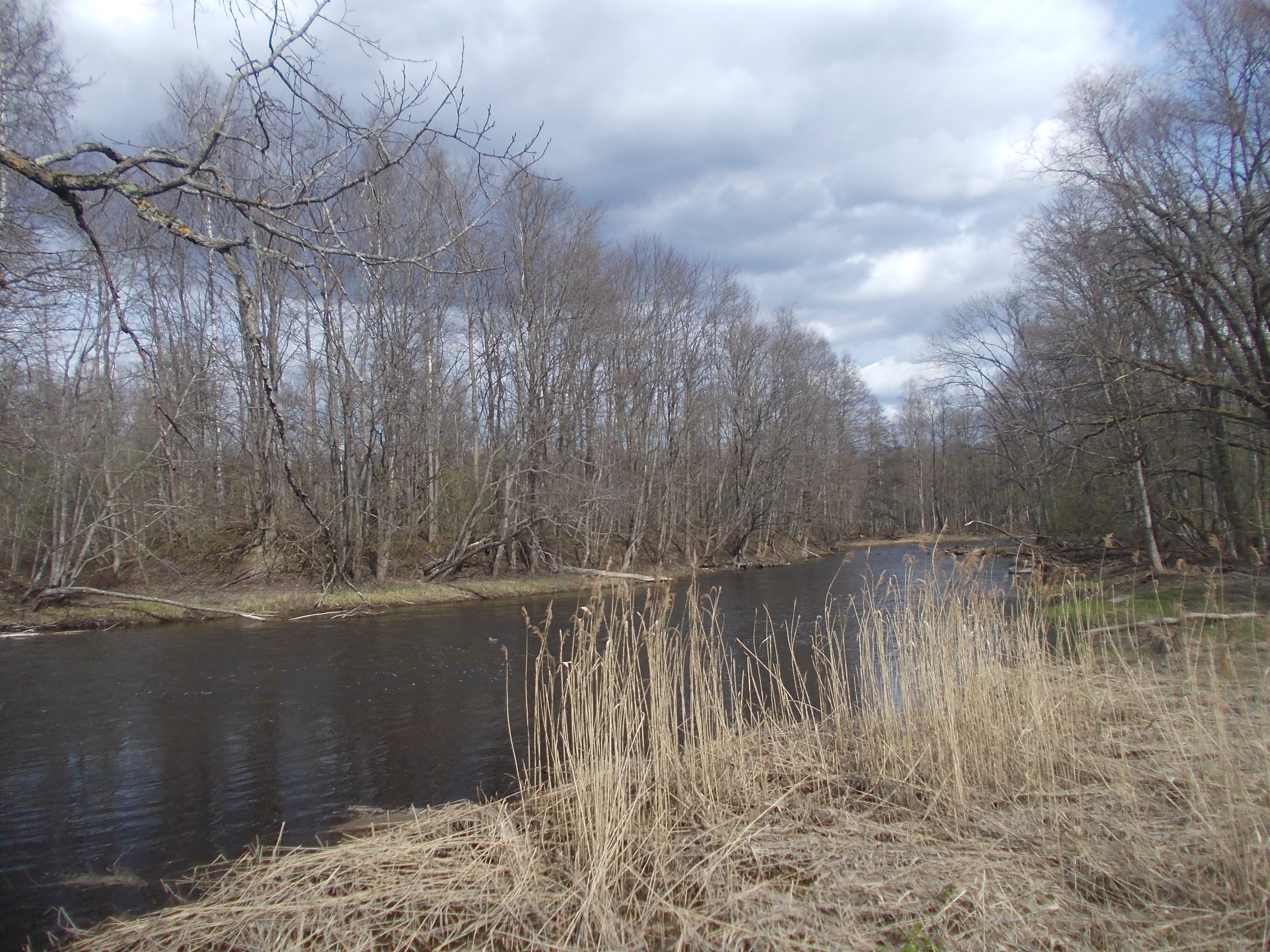 Alam-Pedja looduskaitseala, vaade Rõikalt üle Põltsamaa jõe